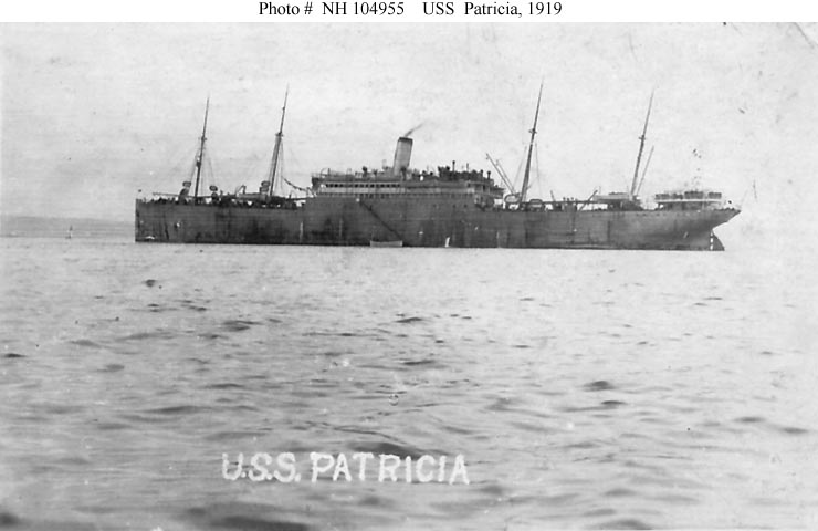 Der Passagierdampfer Patricia der HAPAG nach Auslieferung als US-Truppentransporter